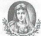 Helena Znojemska